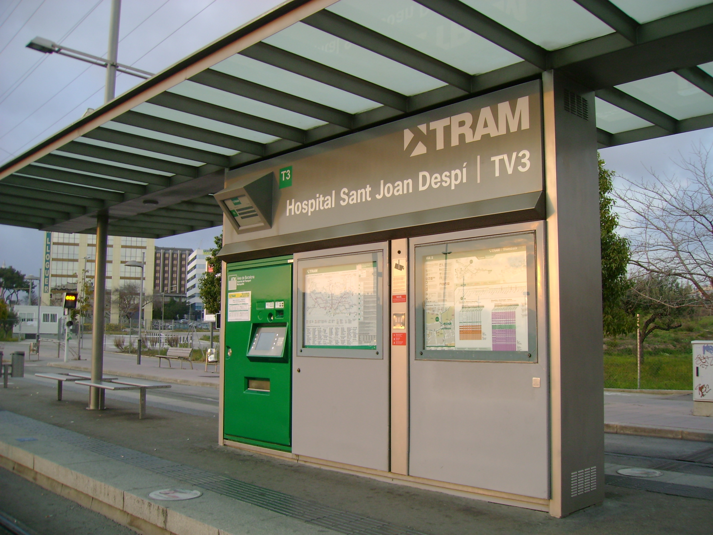 Foto capturada per la meva càmara a l'estació d'Hospital Sant Joan Despí - TV3 (Trambaix).